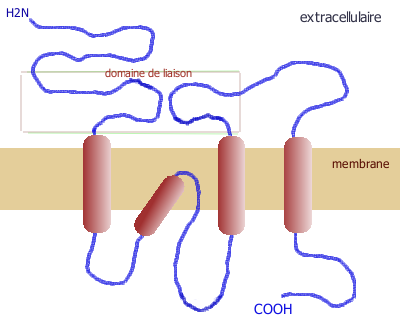 Sous-unité des récepteurs ionotropes du glutamate